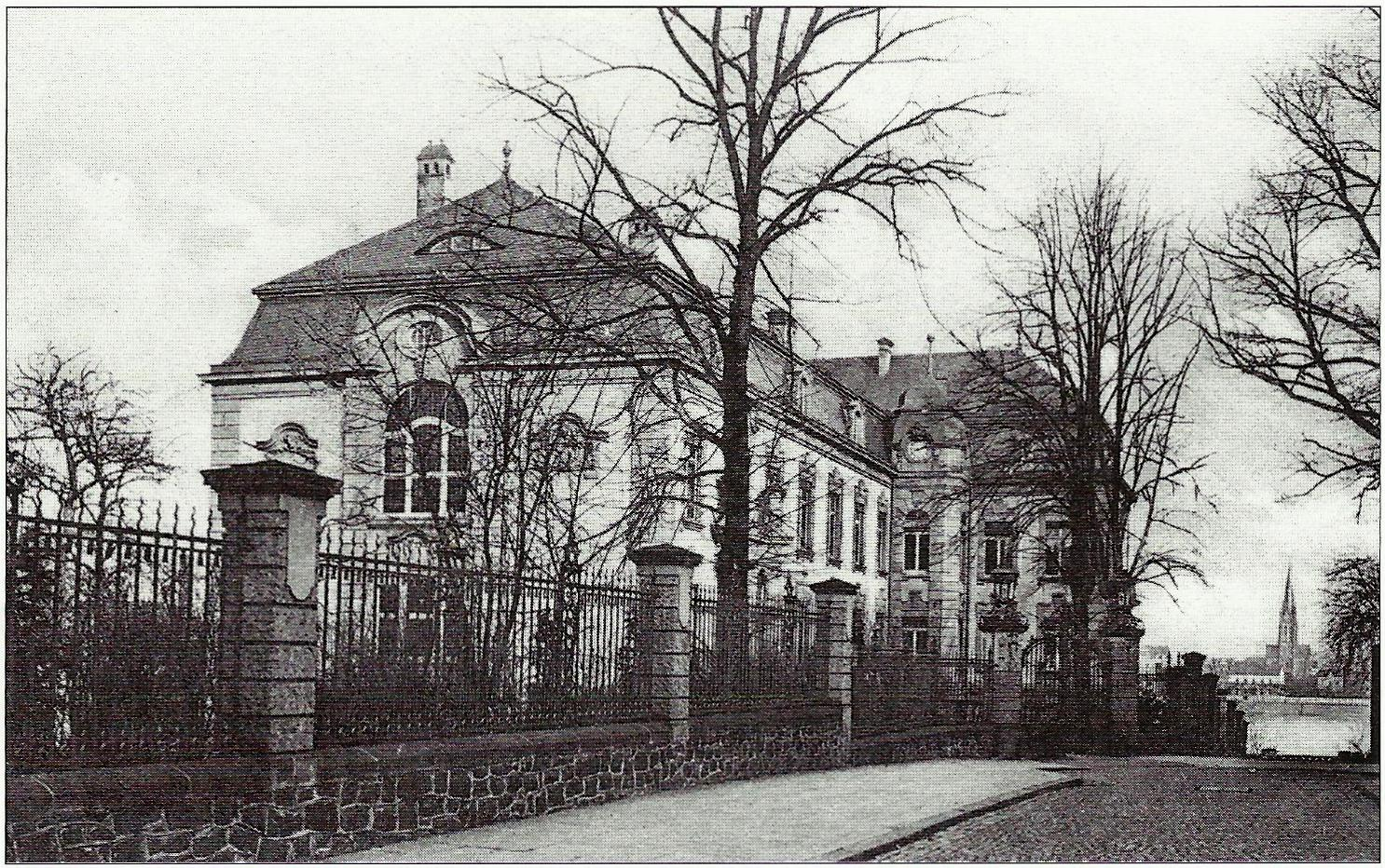 Oberbergamt, Konviktstraße, Bonn; im Hintergrund der Rhein und Beuel